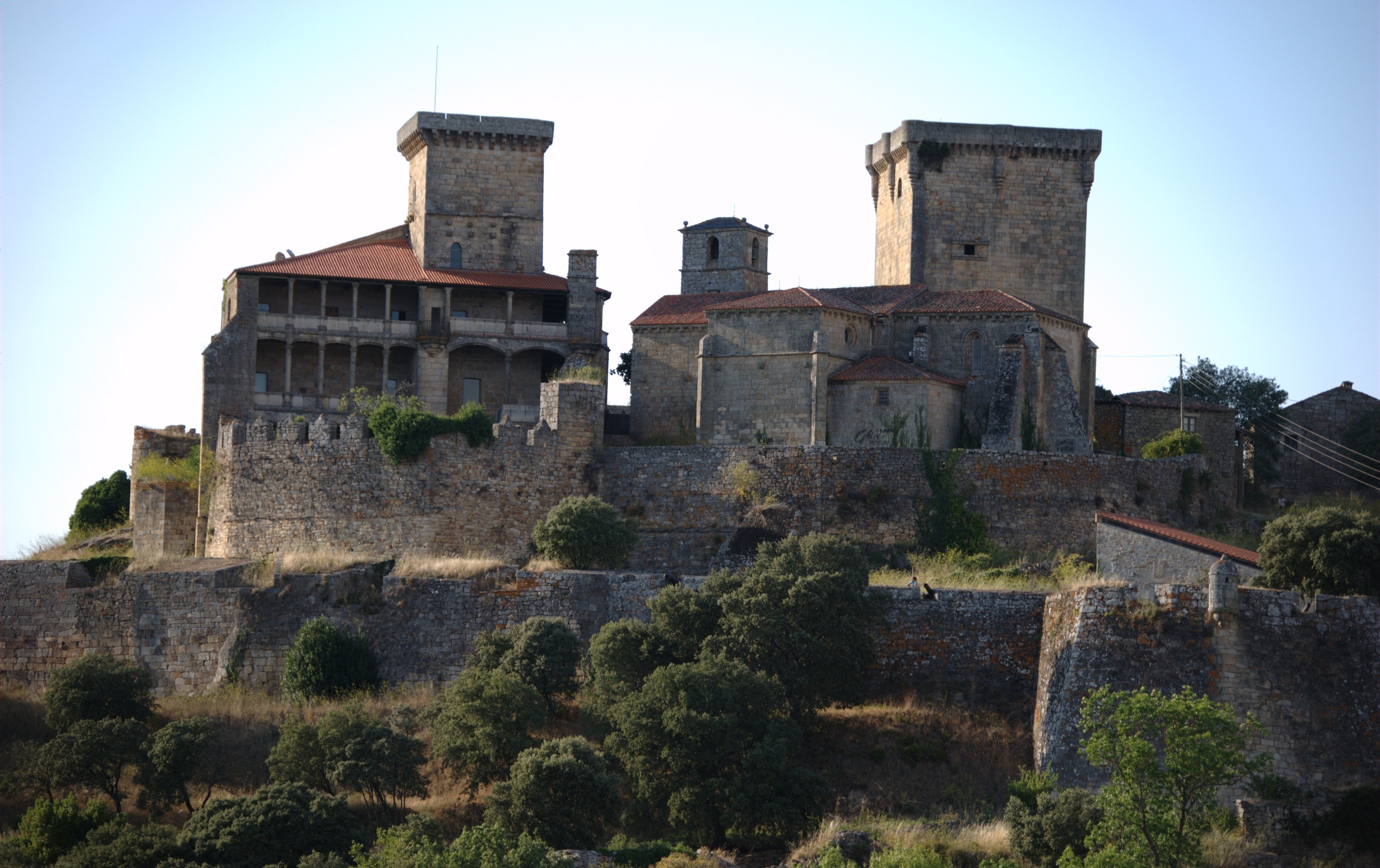 Castelo de Monterrei, Monterrei